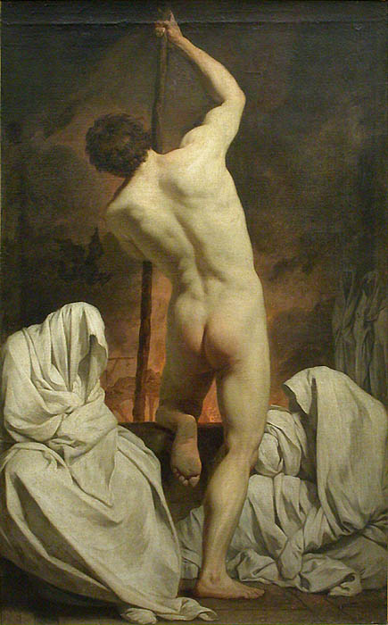 La barque de Caron traverse le Styx pour conduire les âmes jusqu'aux Enfers. En traitant ce sujet rare, Subleyras répondait d'abord aux exigences de l'Académie qui réclamait des jeunes artistes une maîtrise parfaite dans le traitement du nu et des drapés.